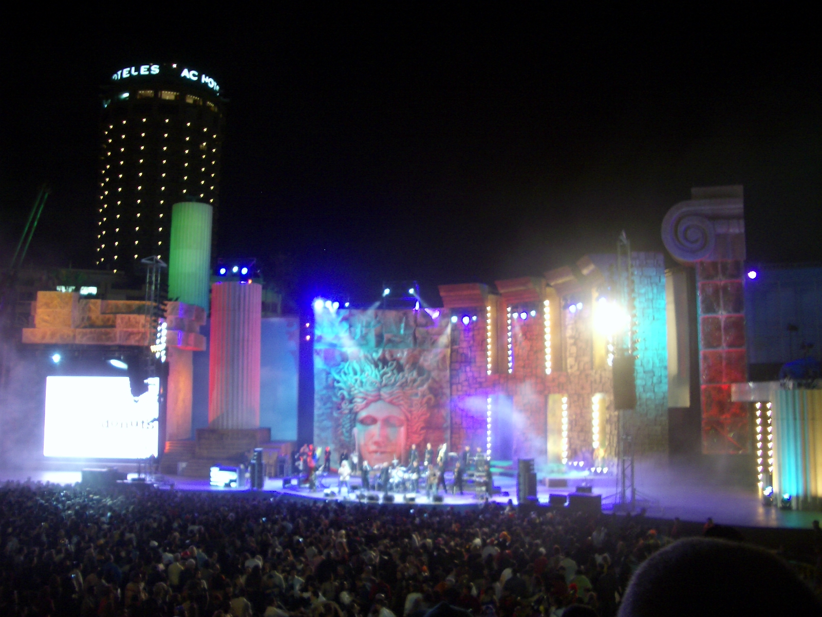 Concierto del Carnaval de Las Palmas de Gran Canaria en el escenario del Parque Santa Catalina. Noche de la Salsa con Óscar de León.